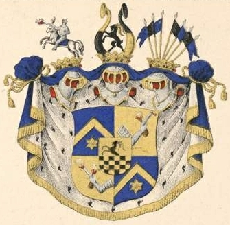 Stenbocki suguvõsa krahvivapp